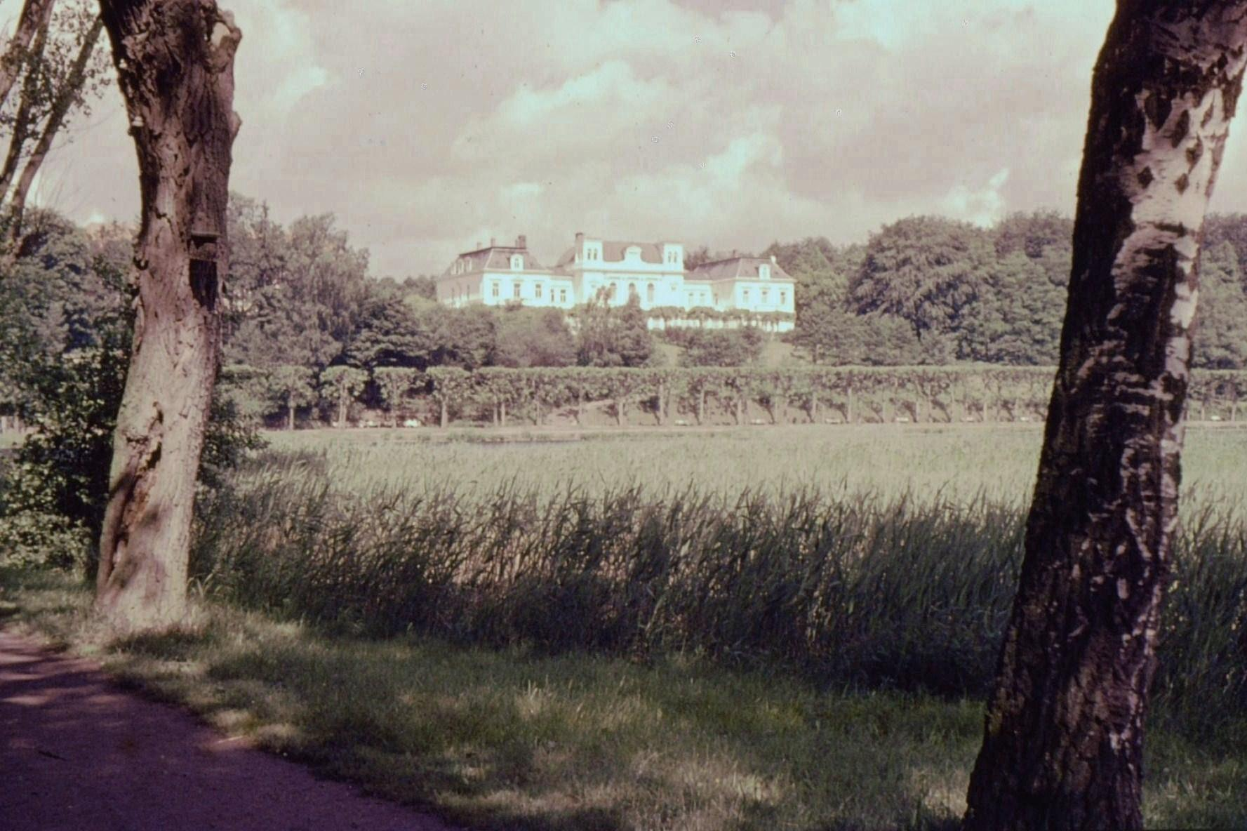 Das alte Segeberger Kurhaus (1885-1966)